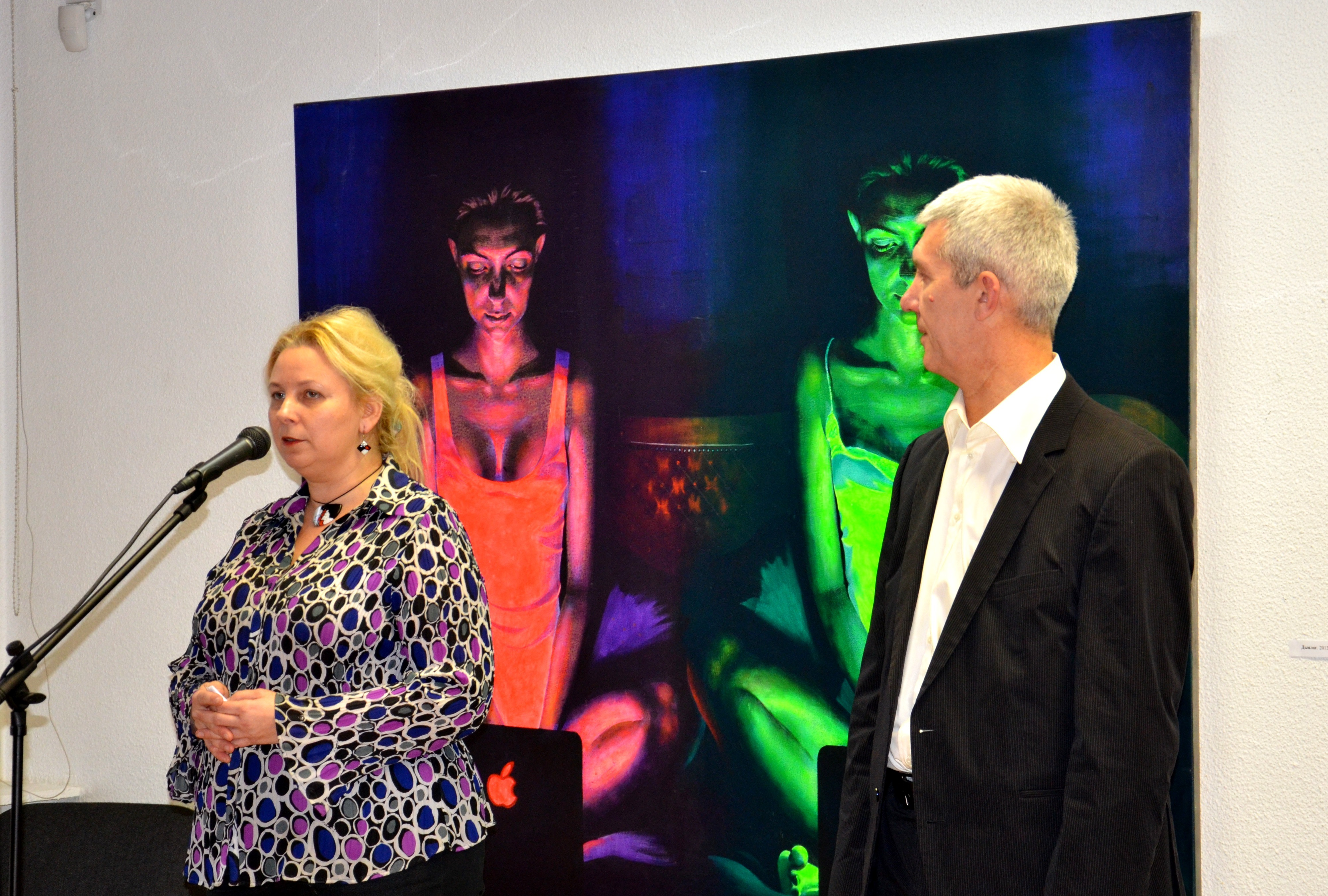 Директор минского Музея Современного изобразительного искусства Наталья Шарангович выступает на открытии выставки художника Сергея Гриневича «Кастинг». 24 декабря 2013 года.